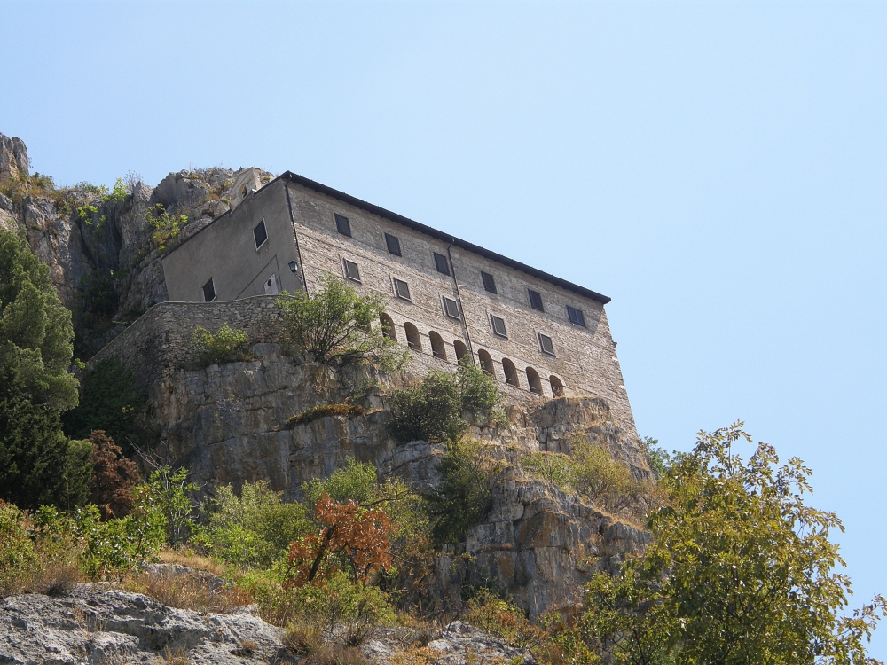 EREMO CELESTINO V in Sulmona